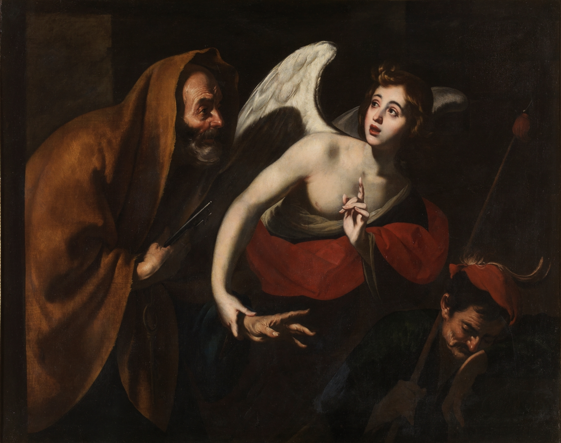 San Pedro liberado por el ángellabel QS:Les,"San Pedro liberado por el ángel"